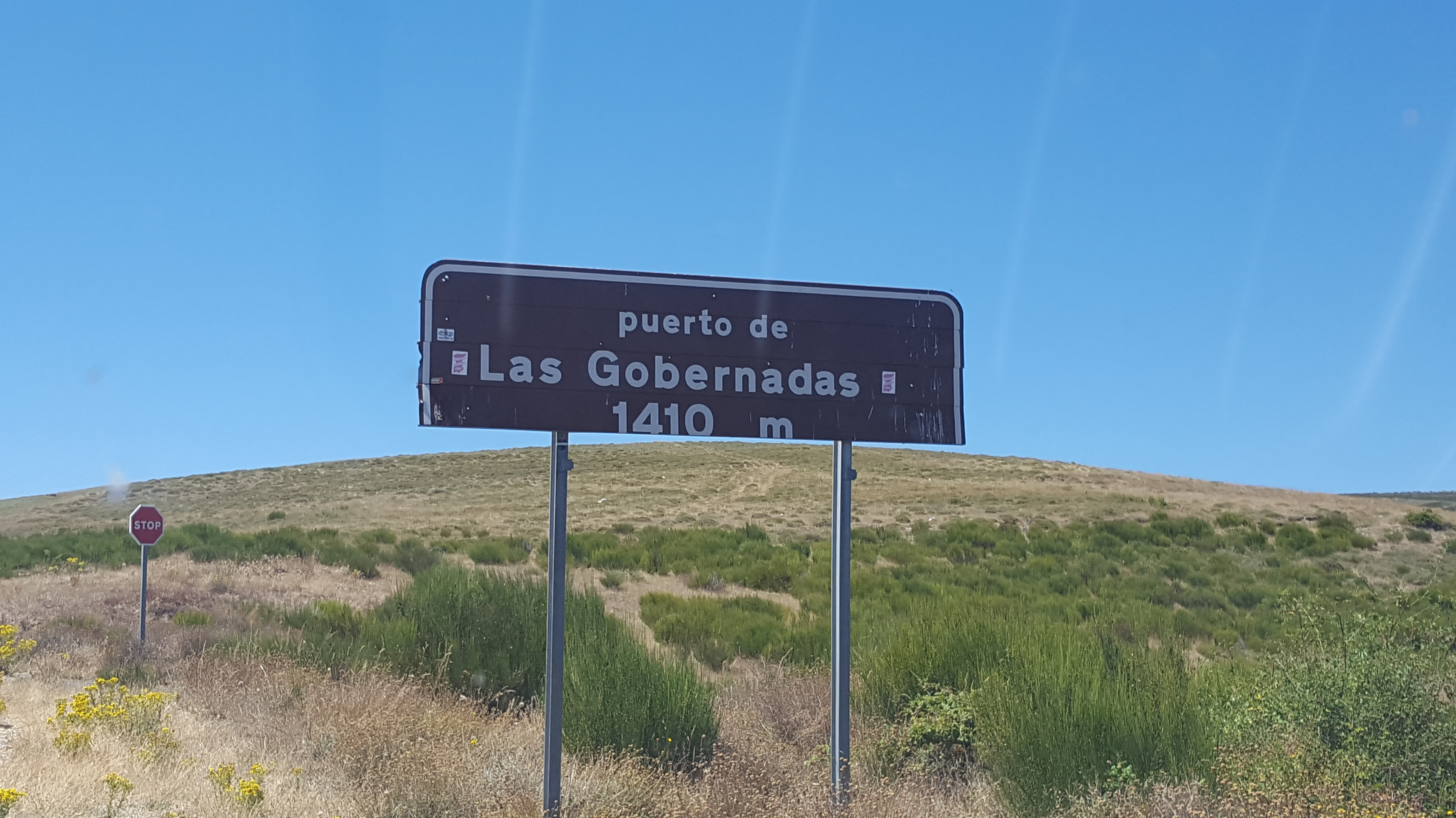 Puerto de las Gobernadas en La Cabrera, Provincia de León España